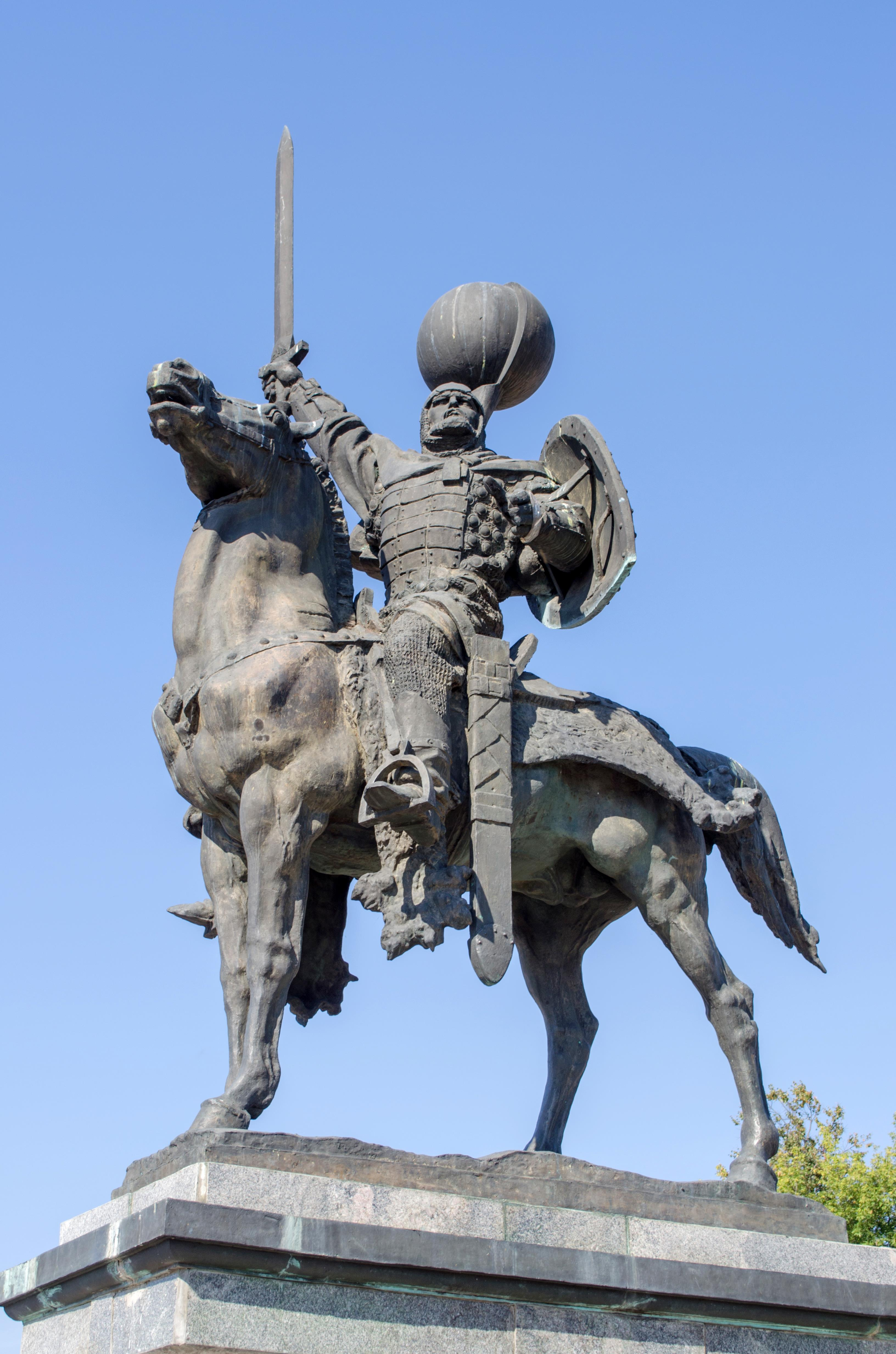 Пам'ятник князю Ігорю, Новгород-Сіверський, площа ім. Леніна